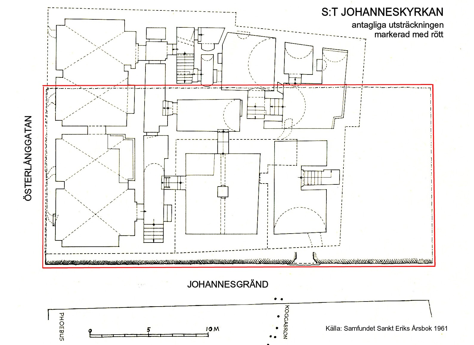 S:t Johanneskyrkans antagliga utsträckning i kv Glaucus i Gamla stan